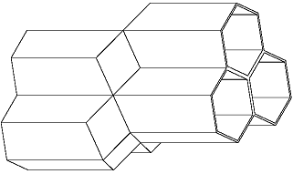 La bildo estas kopiita de en. La originala priskribo estas